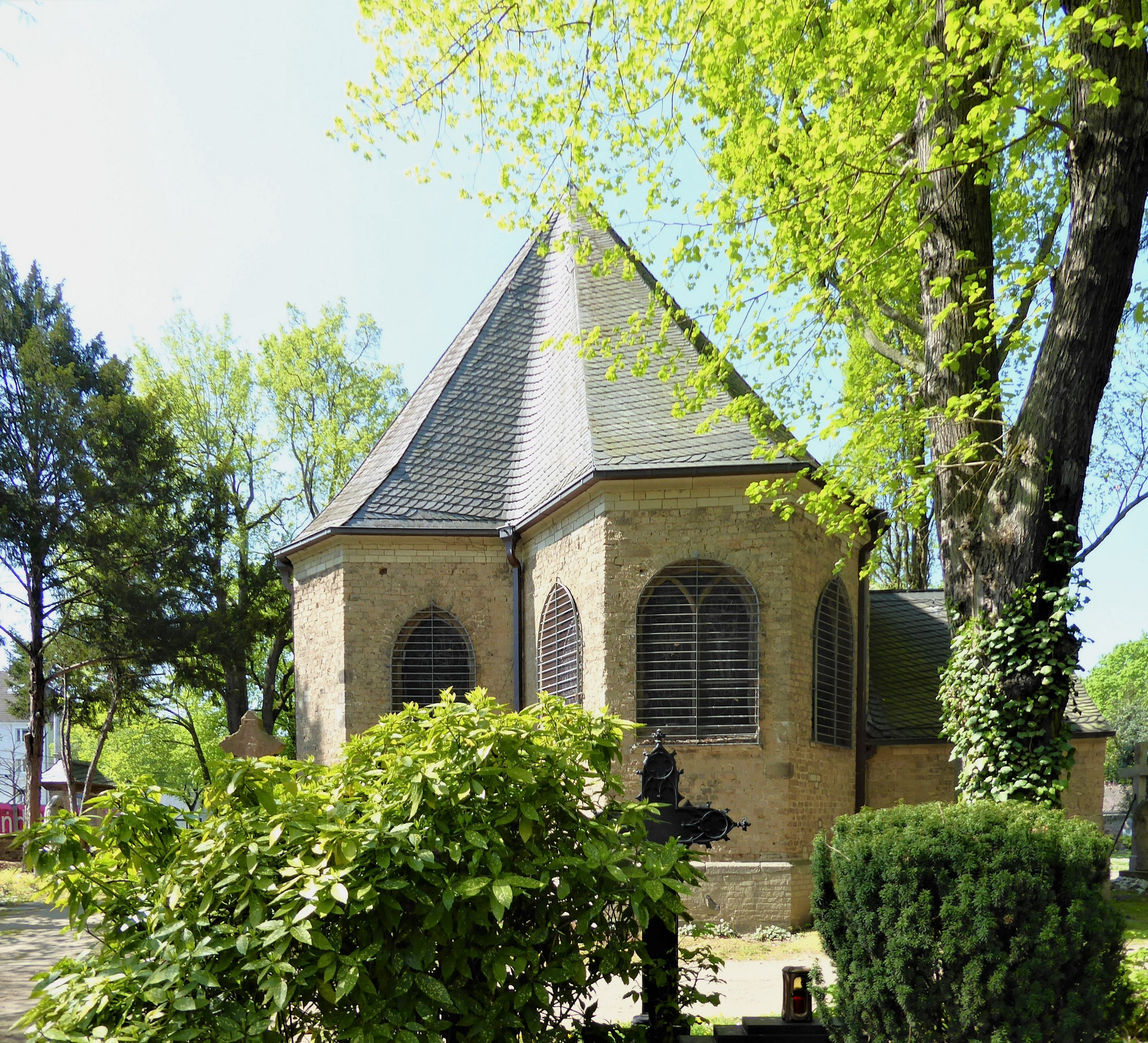 Kapelle Melaten-Friedhof